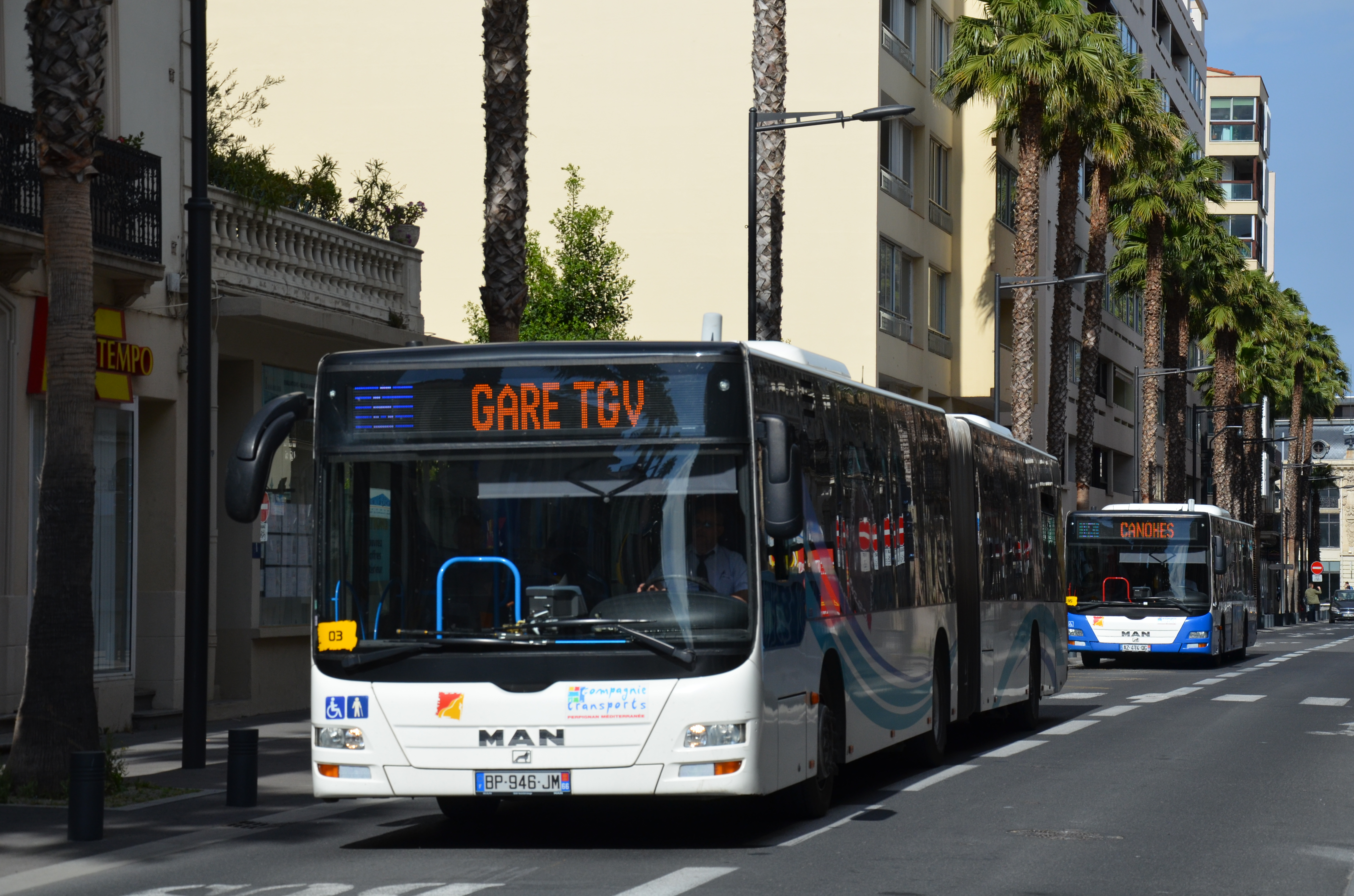 MAN Lion's City G n°103 suivi de près par le MAN Lion's City n°95, près de l'arrêt Cabrit à Perpignan (réseau CTPM).